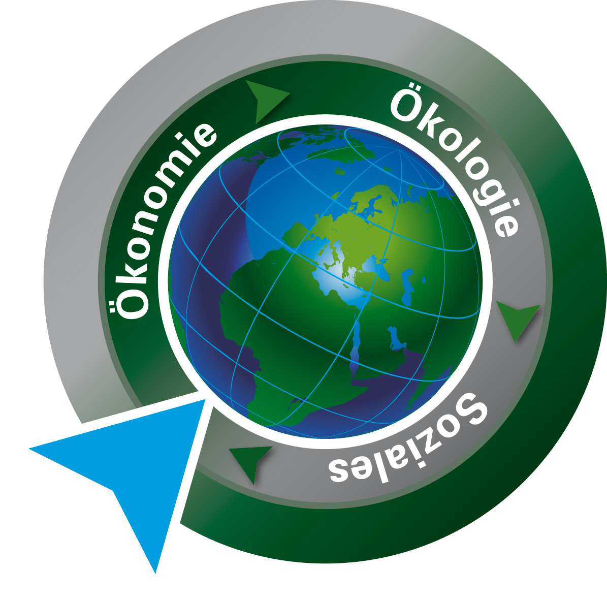 Nachhaltigkeit